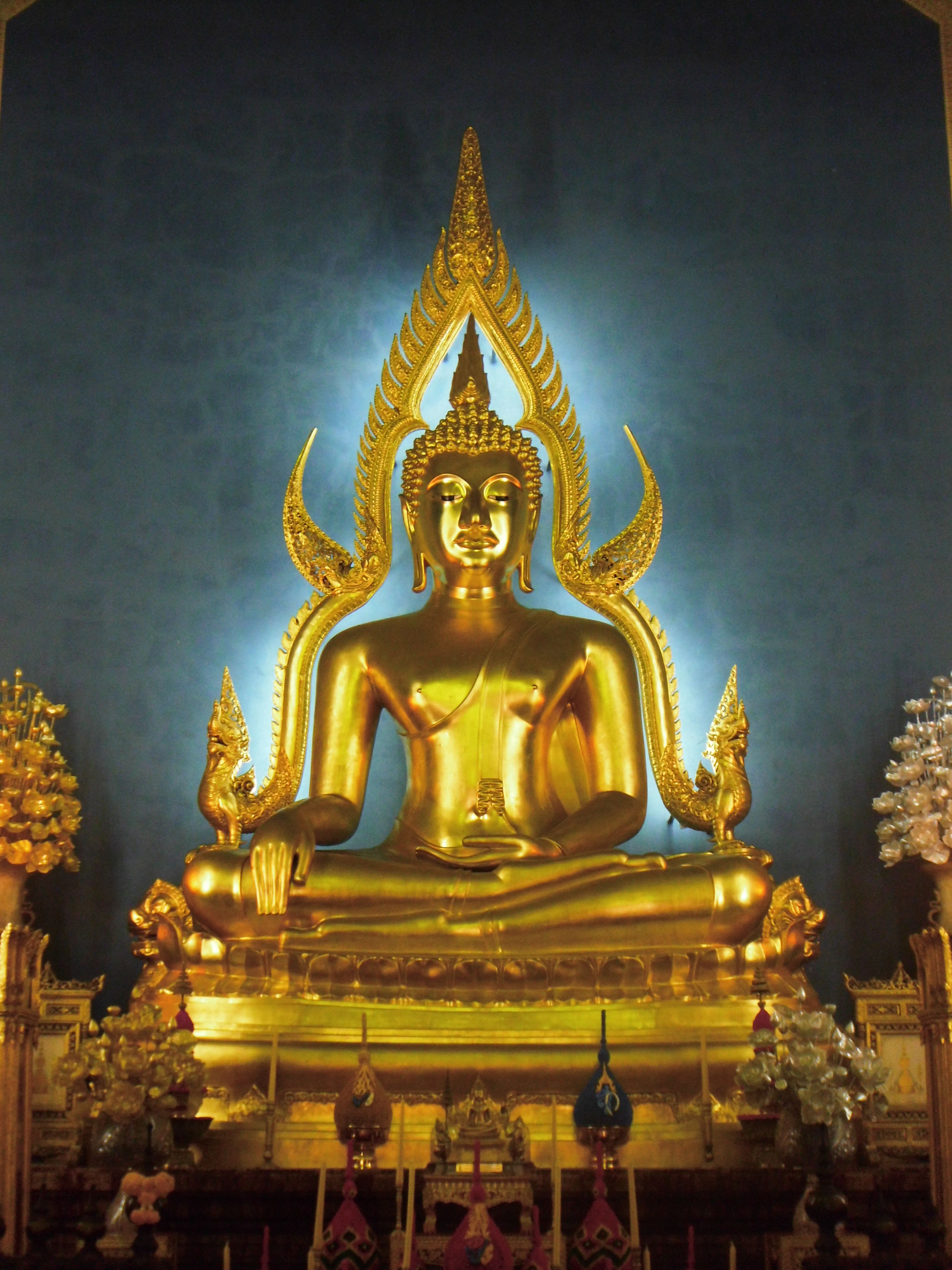 วัดเบญจมบพิตรดุสิตวนาราม